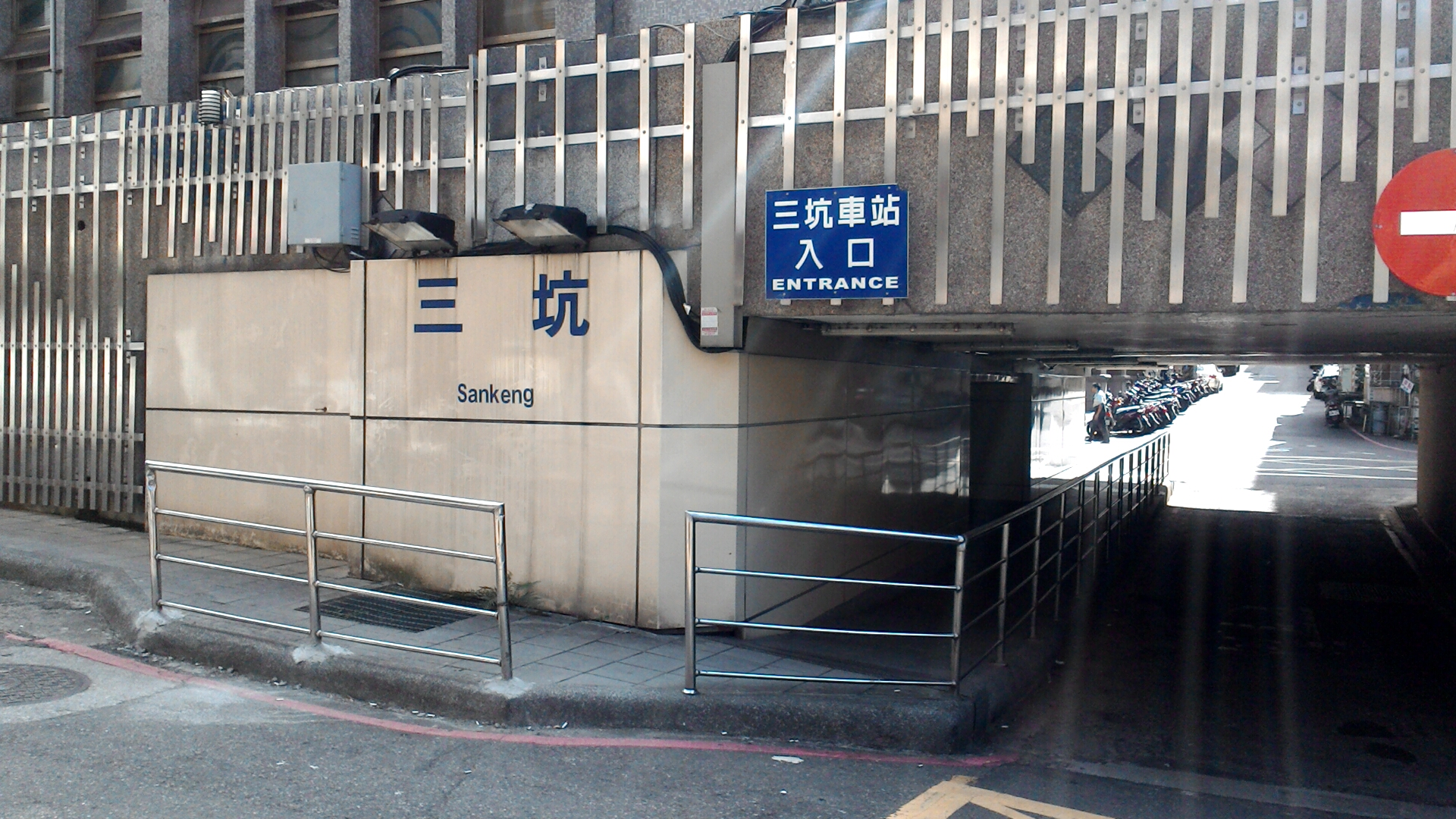 台鐵三坑車站入口,台灣省基隆市仁愛區崇文里